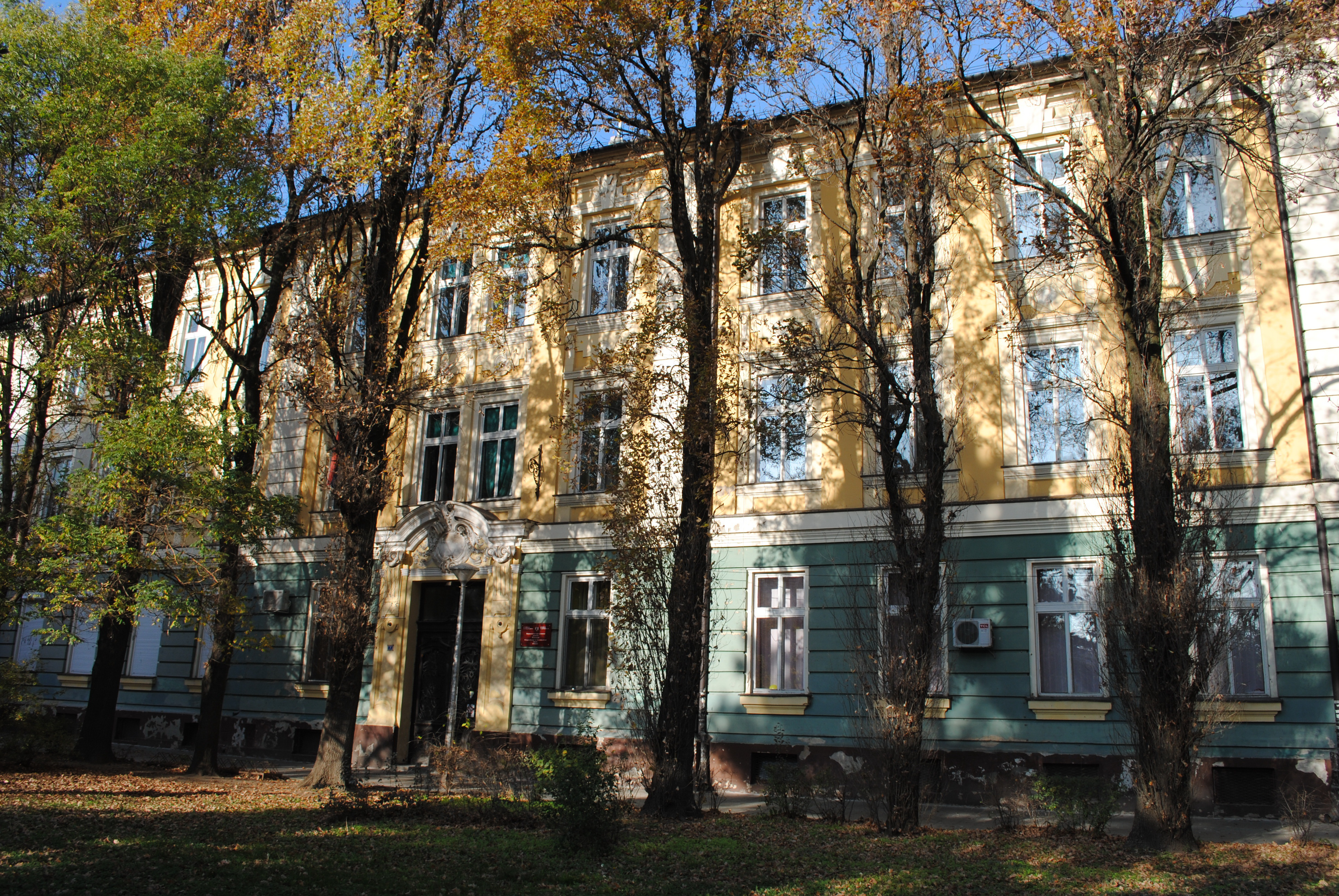 Srpski (latinica): Gradsko jezgro Kikinde, PKIC 62, Zgrada Gimnazije, sagradjena 1900.